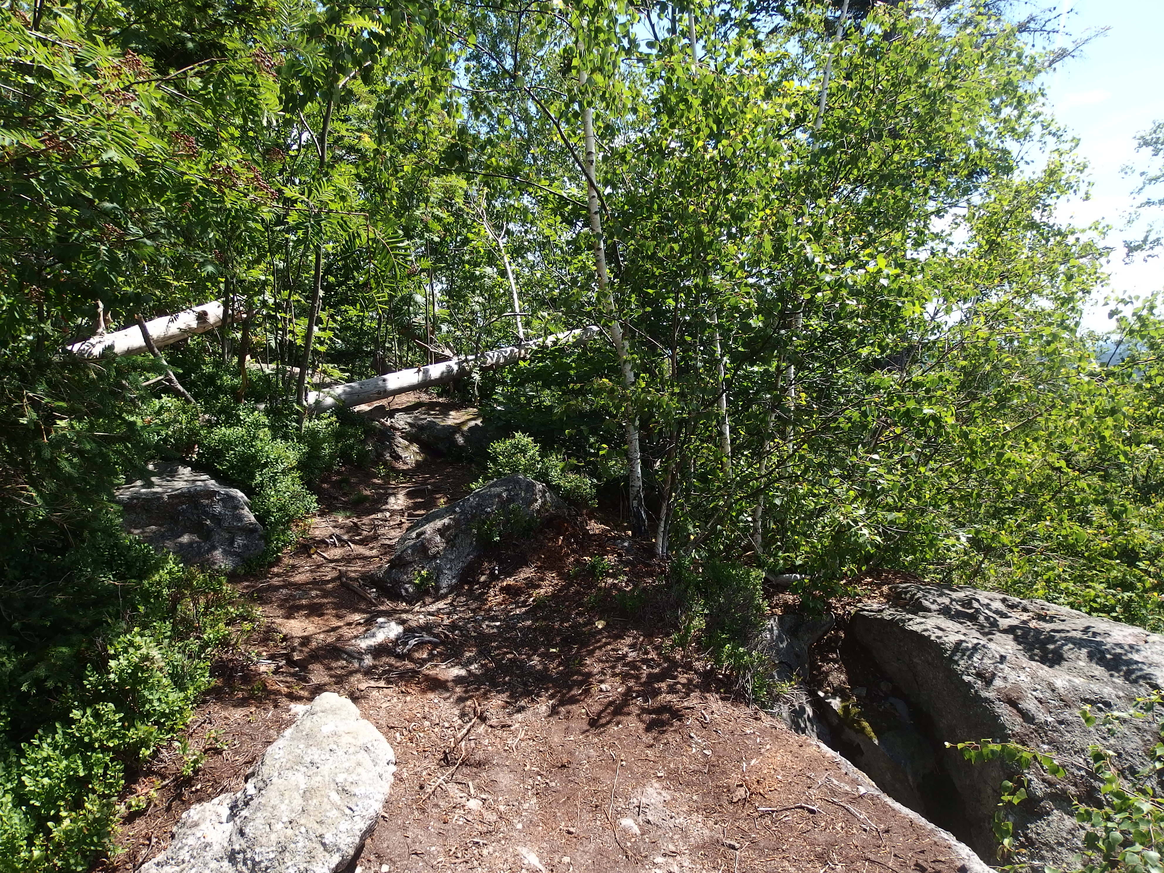 Loučovice, okres Český Krumlov. Vrchol Medvědí hory (934) ve stejnojmenné přírodní památce. Součást Přírodního parku Vyšebrodsko.